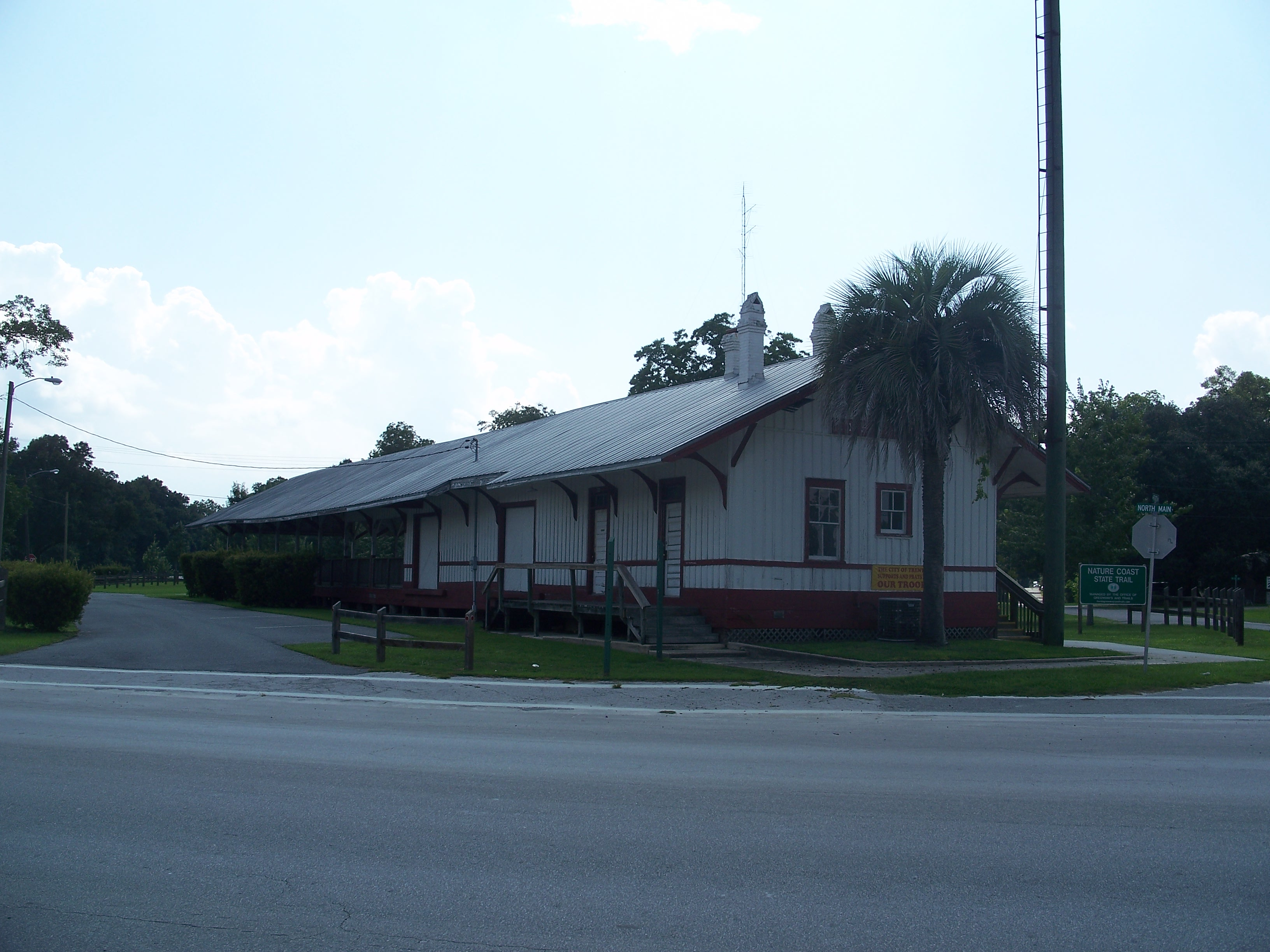 Trenton, Florida: Trenton Depot